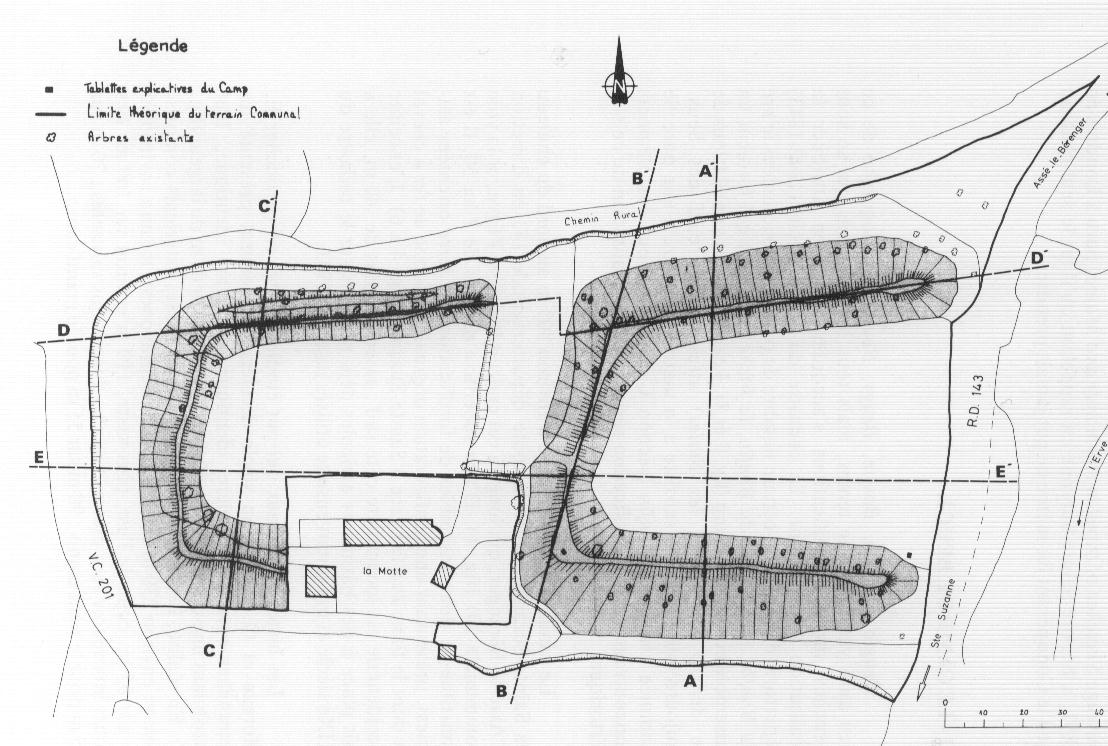 Plan des deux camps de Beugi Ste-Suzanne (Mayenne)